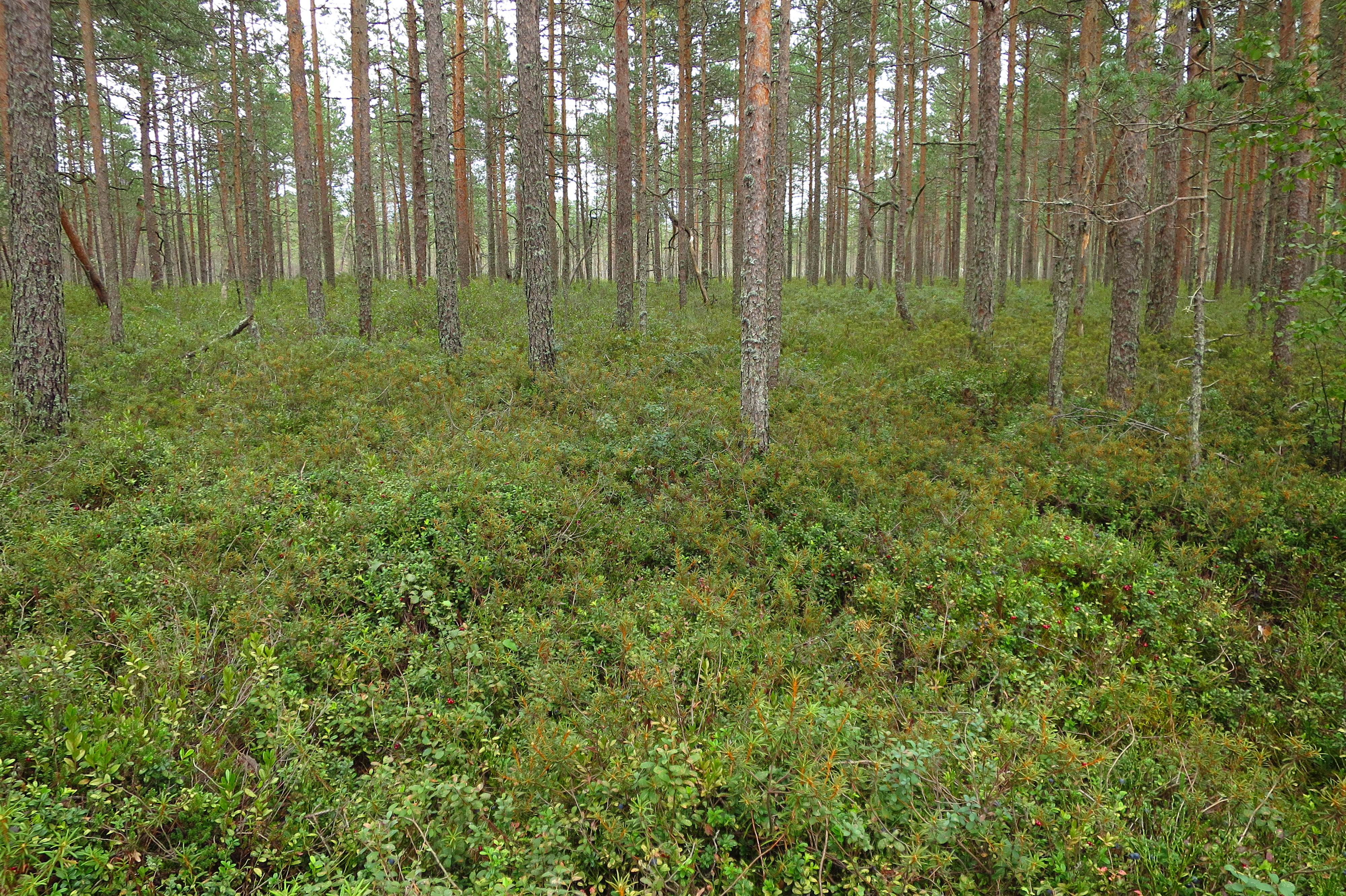 Kirikumäe soo e Järvesuu Kirikumäe MKA-l